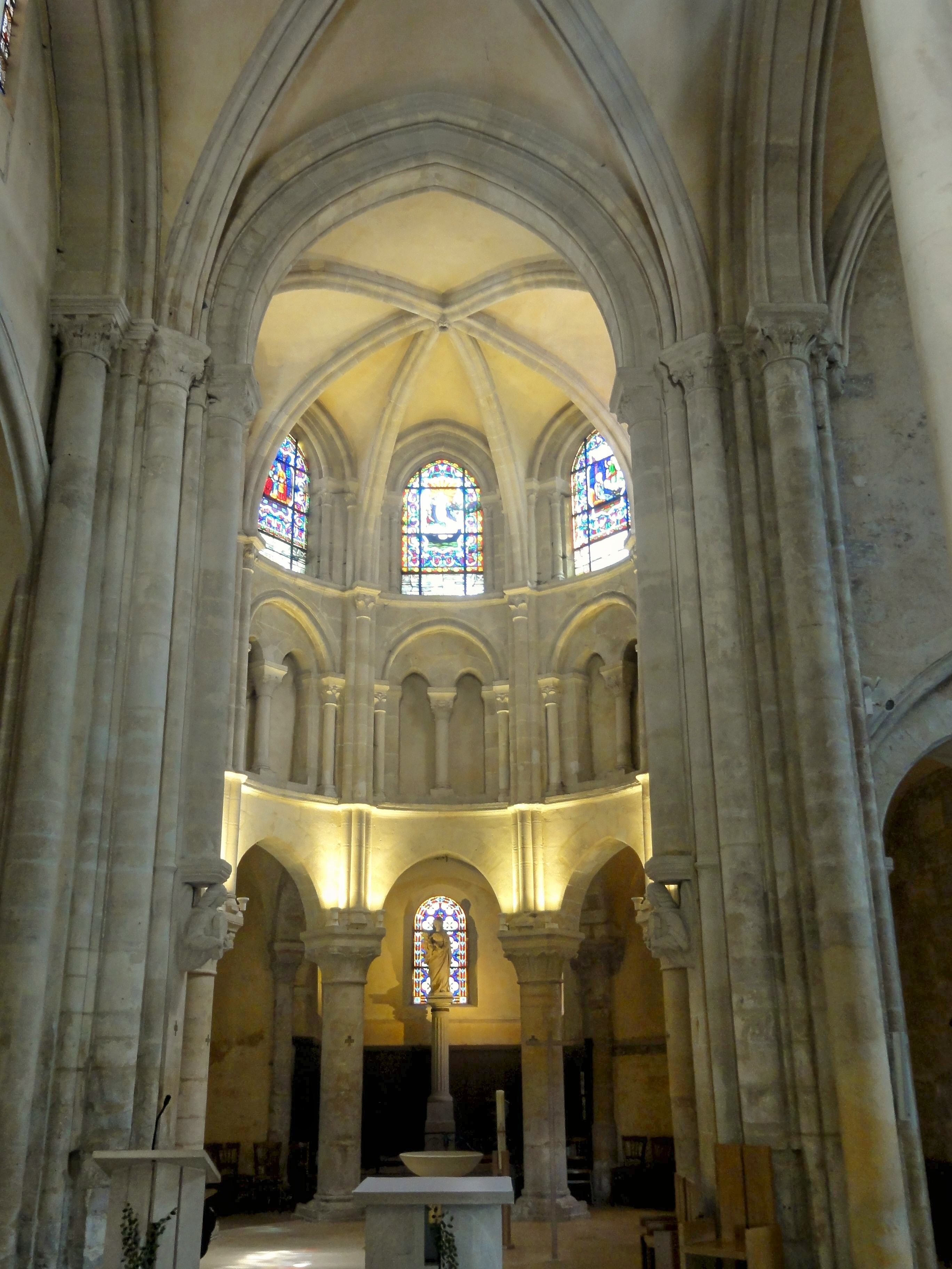 Croisée du transept, vue dans l'abside.